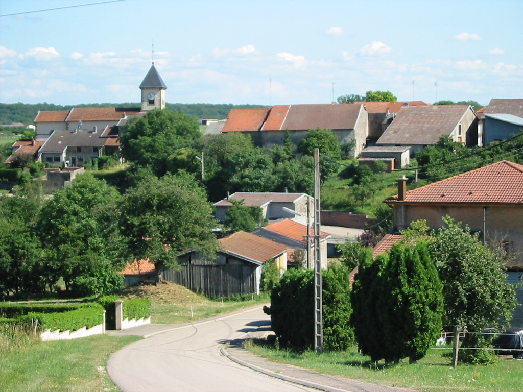 Saint-Genest Vue d'ensemble Commune du canton de Rambervillers (Vosges) Photo personnelle du 10 juillet 2006. Copyright © Christian Amet